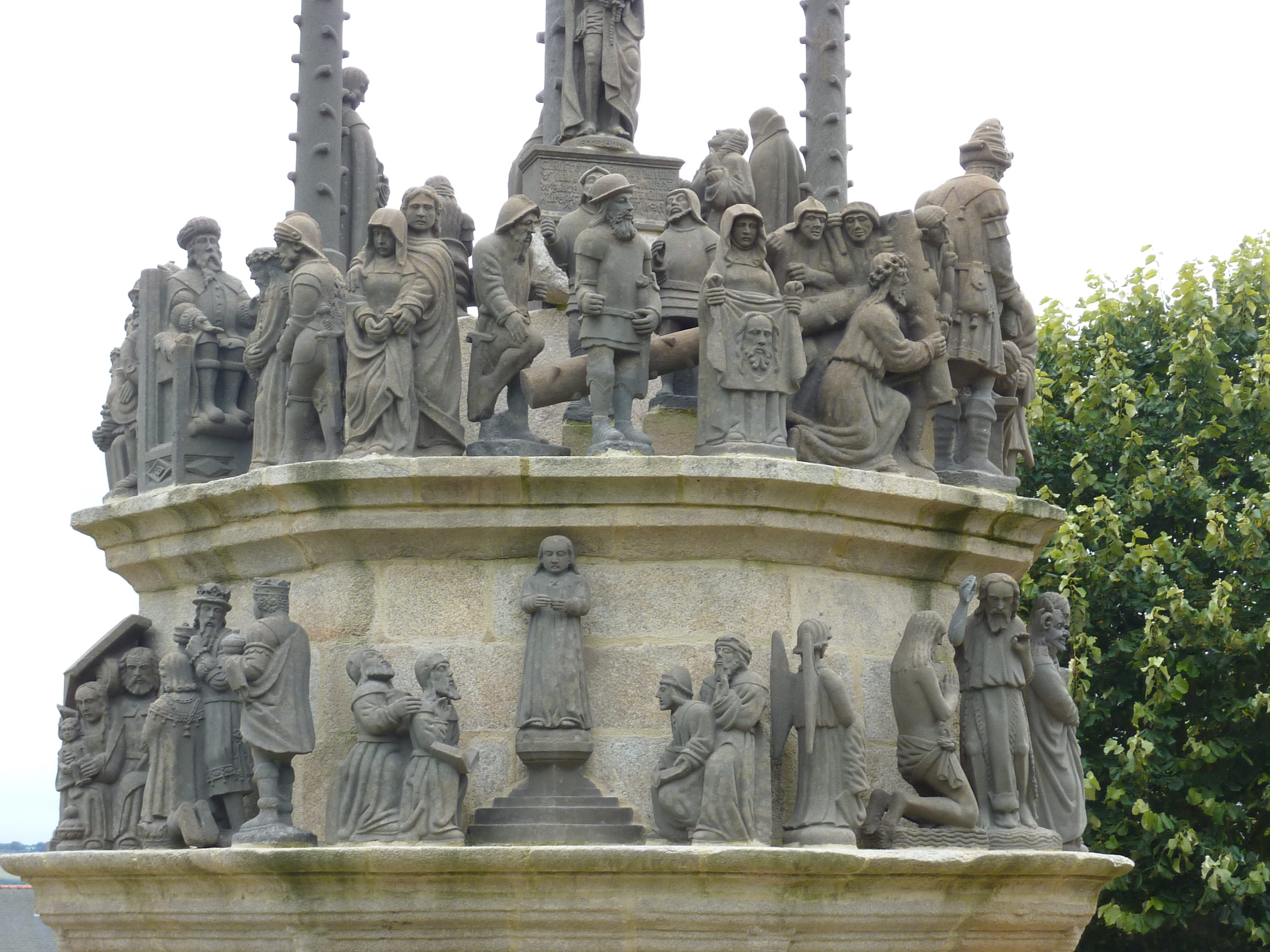 Plougonven: le calvaire, vue partielle